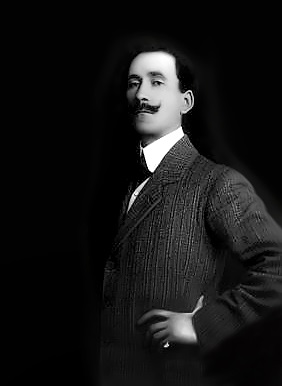 Domenico Tumiati